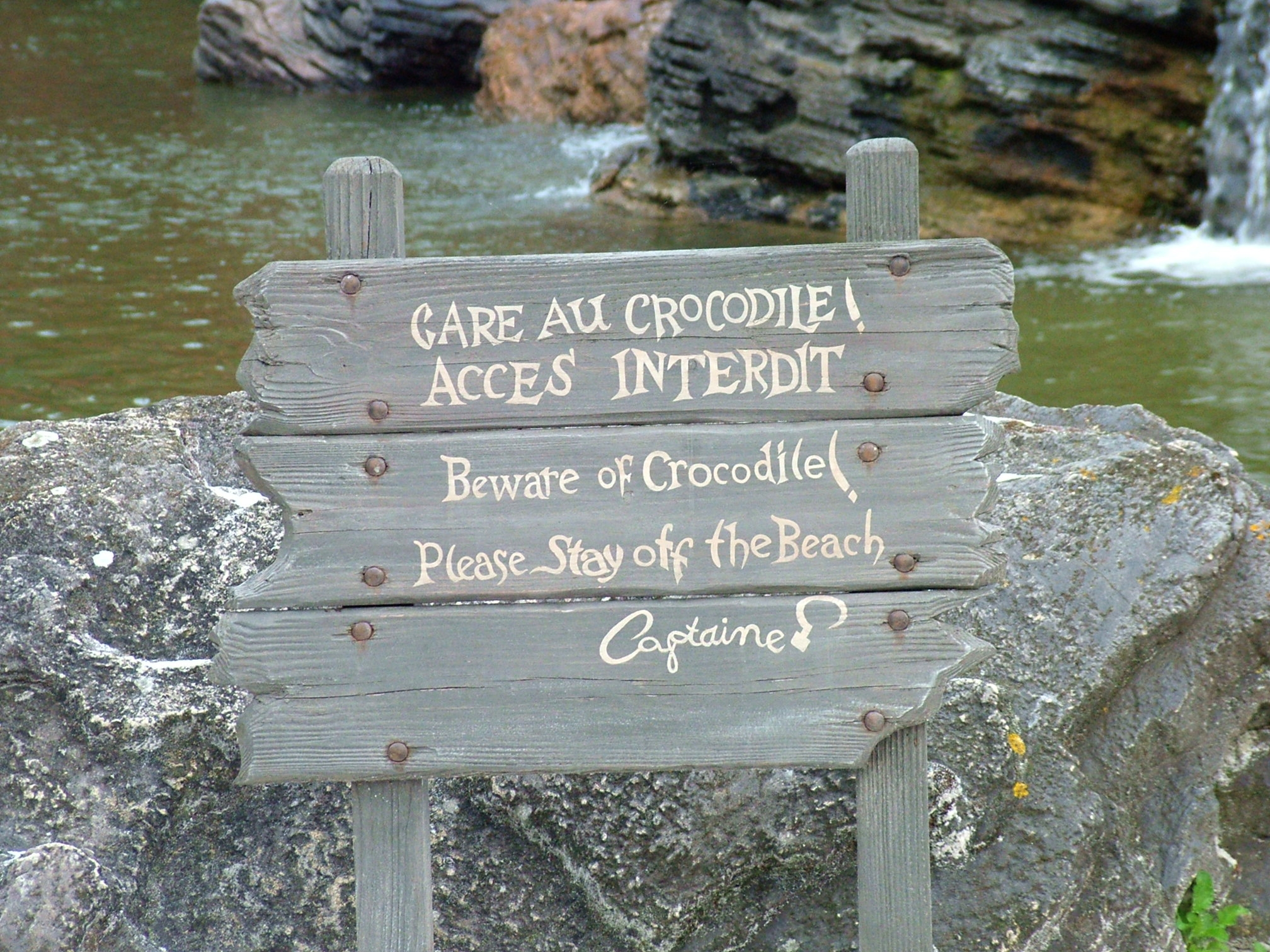 Panneau de signalisation mettant en garde la présence d'un crocodile.